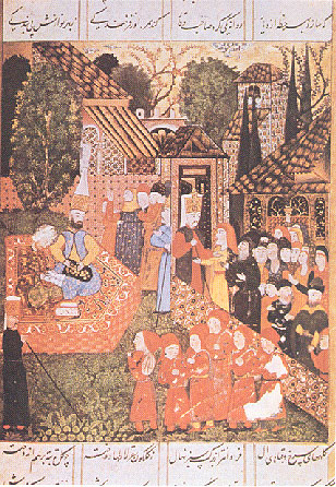 Devşirme or (en) devshirmeh (bloodtax) was a system of taking every fifth child from occupied areas under the Ottoman empire.